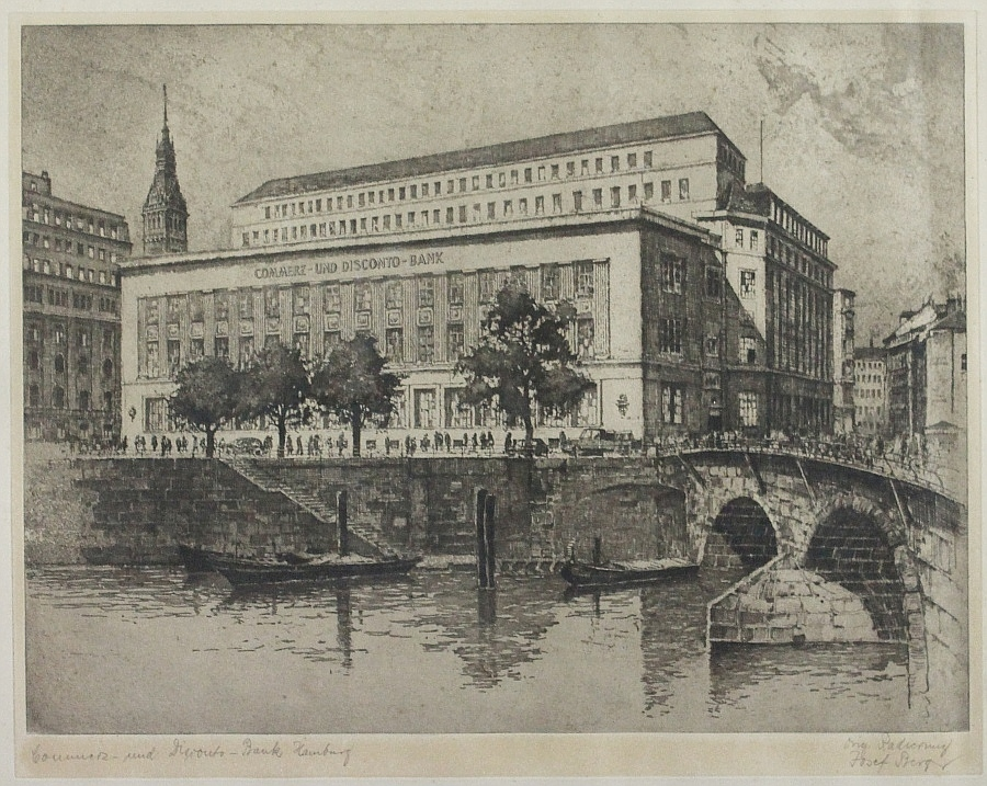 "Commerz- und Disconto-Bank Hamburg" (erbaut 1874), unten rechts bleistiftsigniert "Josef Berg" und links betitelt, Plattenrand: 43,5 cm x 56 cm